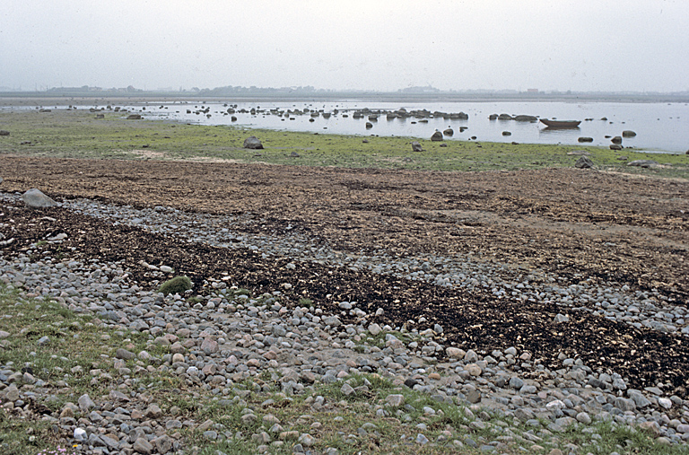 Bilden troligen från mitten av 1970-talet. Motiv: Morups Tånge Nyckelord: Naturreservat, Riksintressen Kategori: Kust- och skärgårdsmiljö Bilden troligen från mitten av 1970-talet.